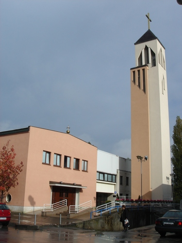 Župna crkva sv. Josipa, Zagreb - Trešnjevka